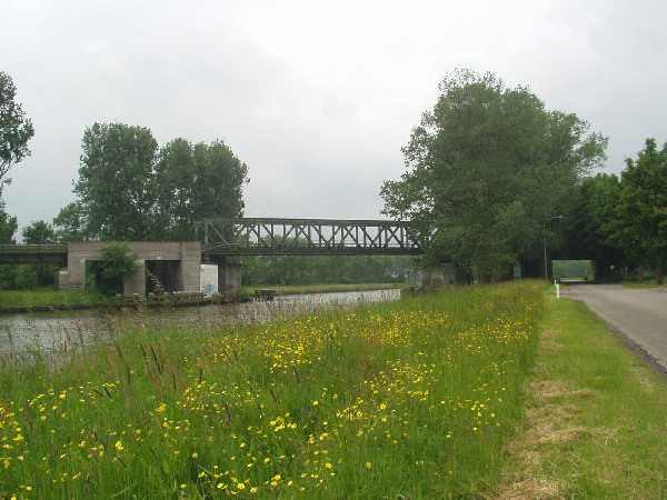 zelf gemaakt op 2/6/2005 (я!k)